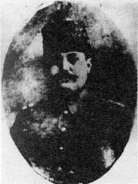 Османский генерал Махмут Камиль-паша.